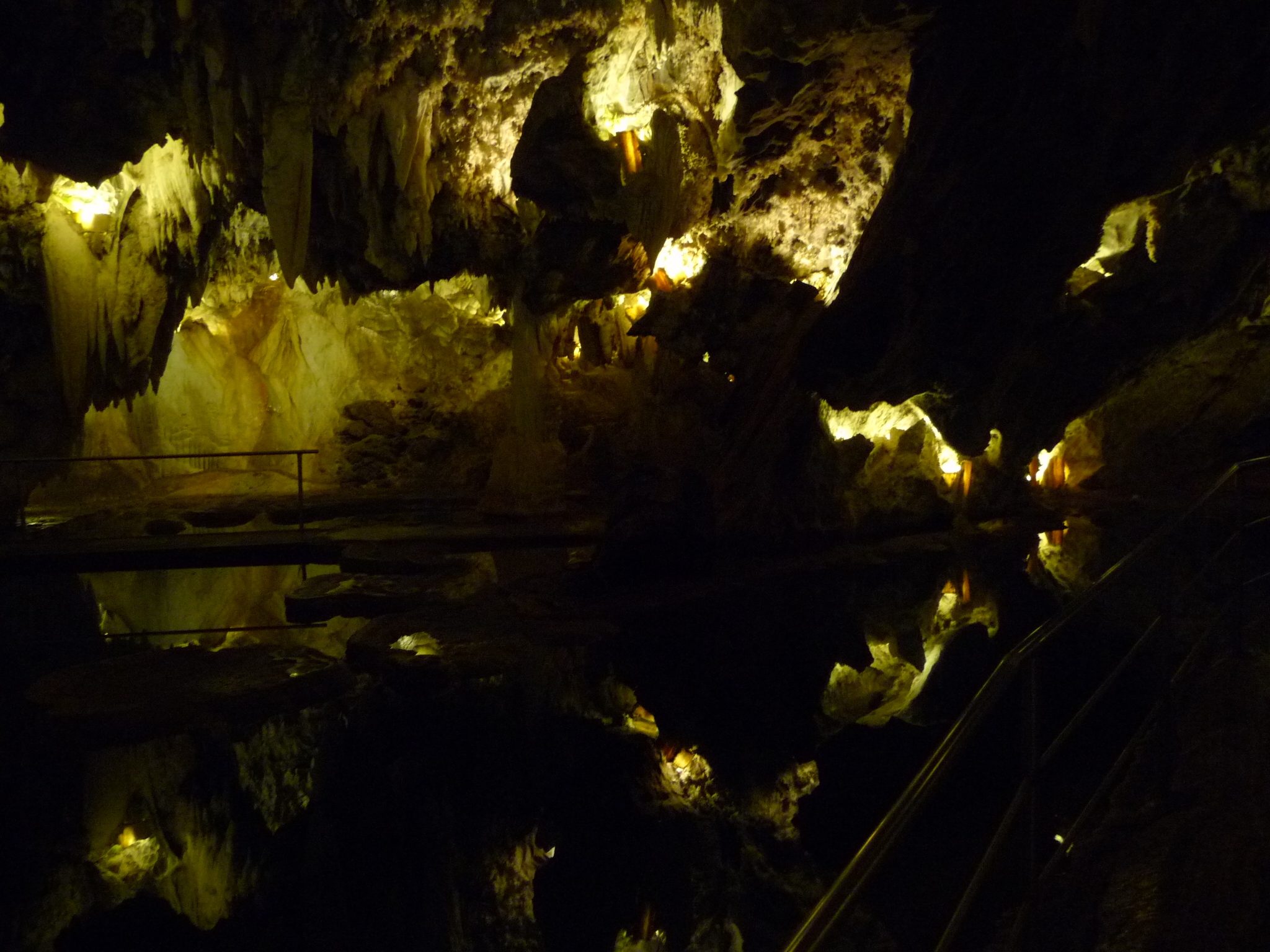 GrutaDeLasMaravillas-Aracena-P1040614.JPG